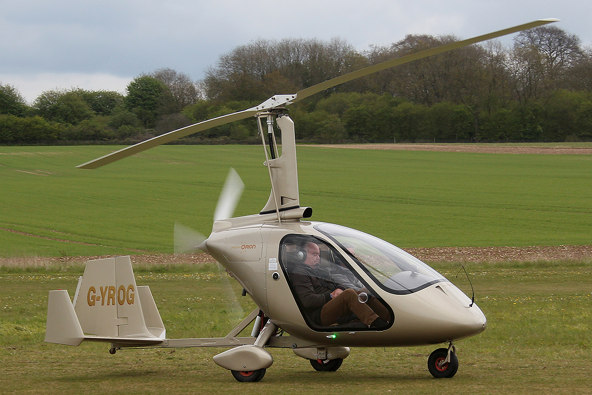 G-YROG Magni Gyro M-24C Orion @ Popham 29/04/2017